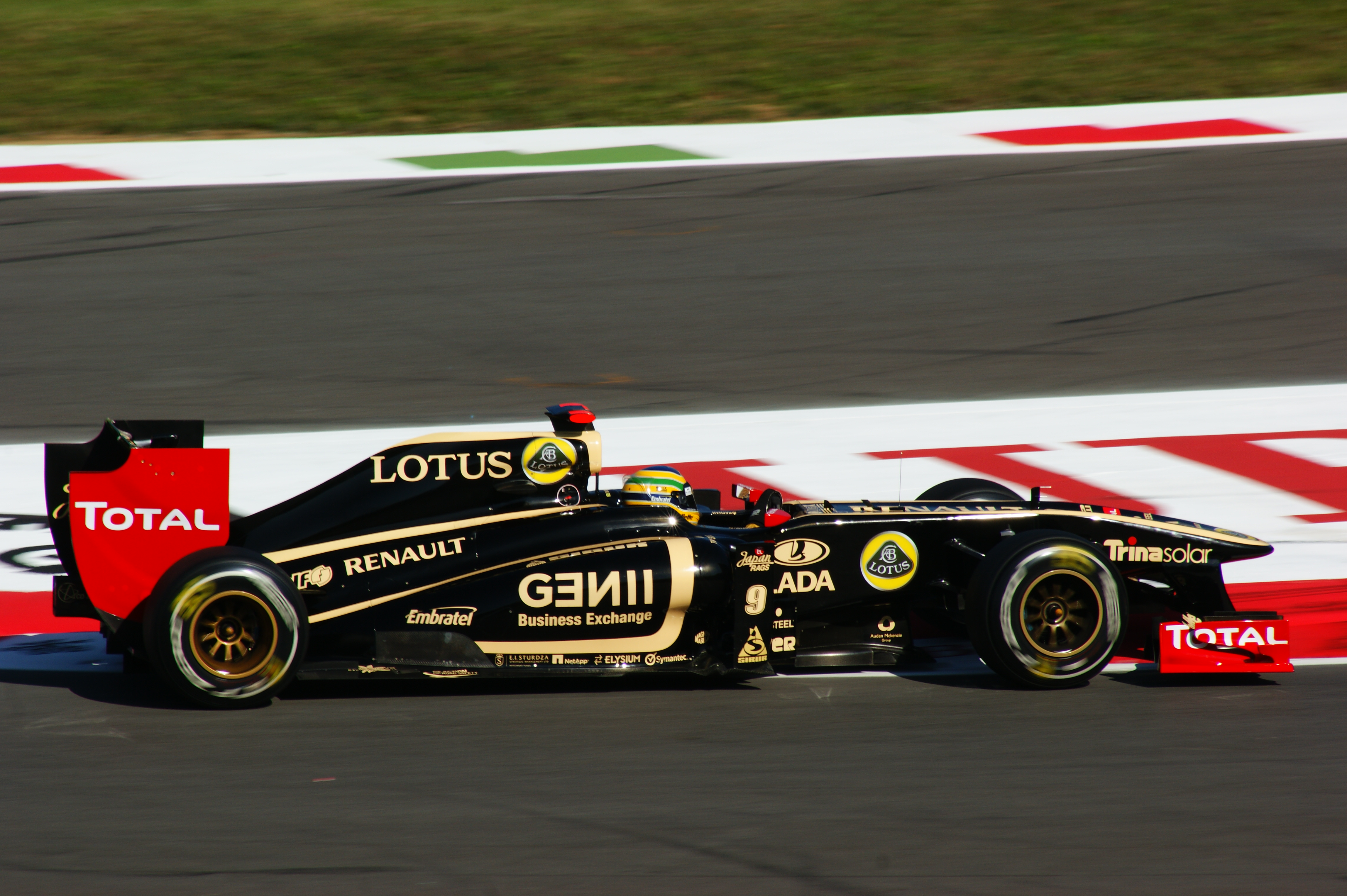 Bruno Senna alla prima variante Monza 2011